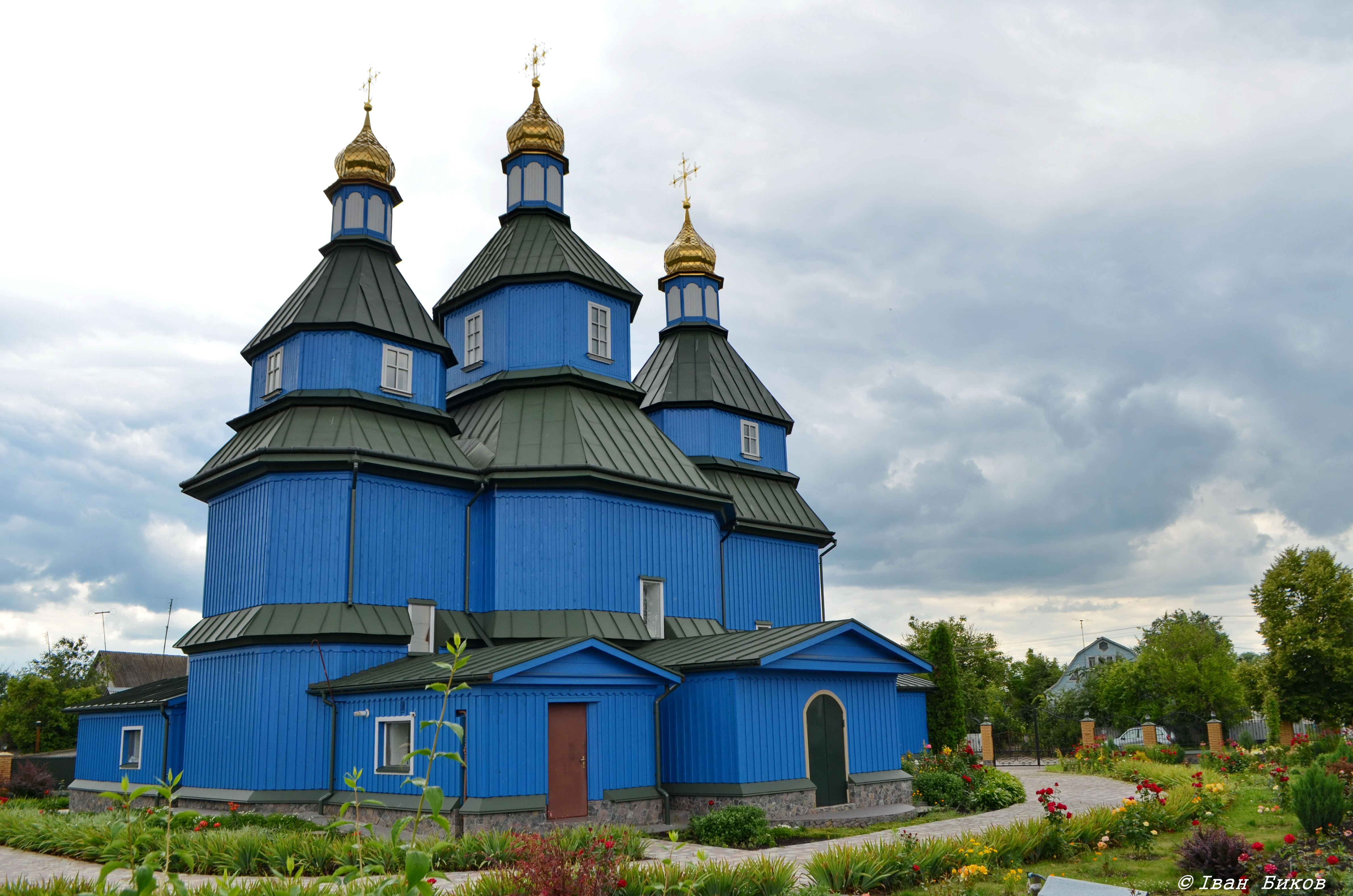 Острів. Свято-Михайлівська церква. 1740 р. Наддніпрянська архітектурна школа українського народного зодчества.